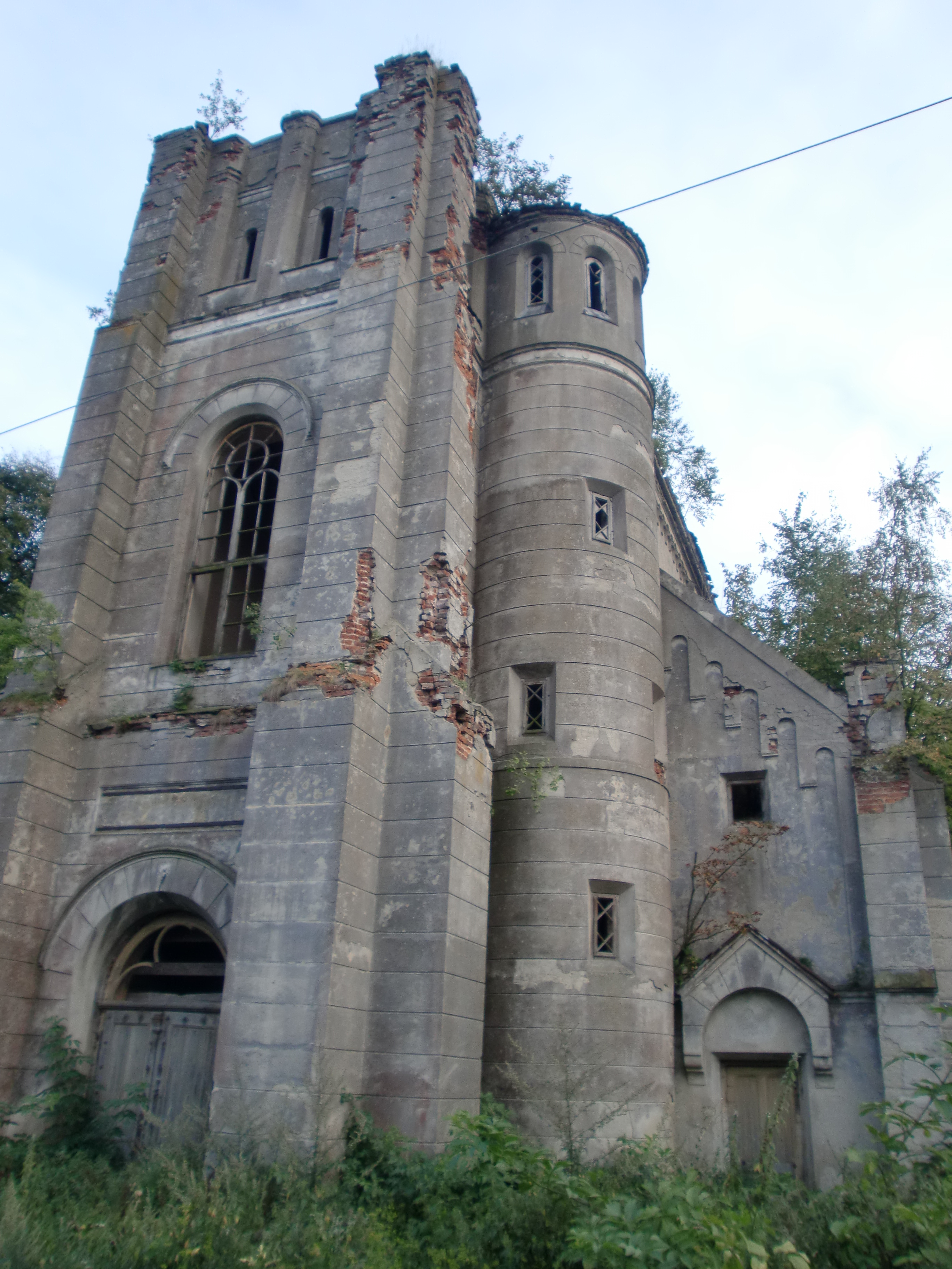 Закинутий католицький храм в с.Родатичі